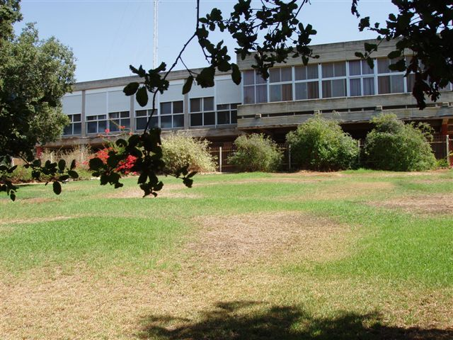 חדר האוכל ביחיעם